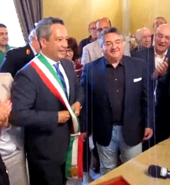 Passaggio di consegne tra il sindaco uscente Michele Campisi (a dx) e il neo-eletto sindaco Giovanni Ruvolo (a sx). Caltanissetta, 12 giugno 2014 Licensing Categoria:Immagini di Caltanissetta